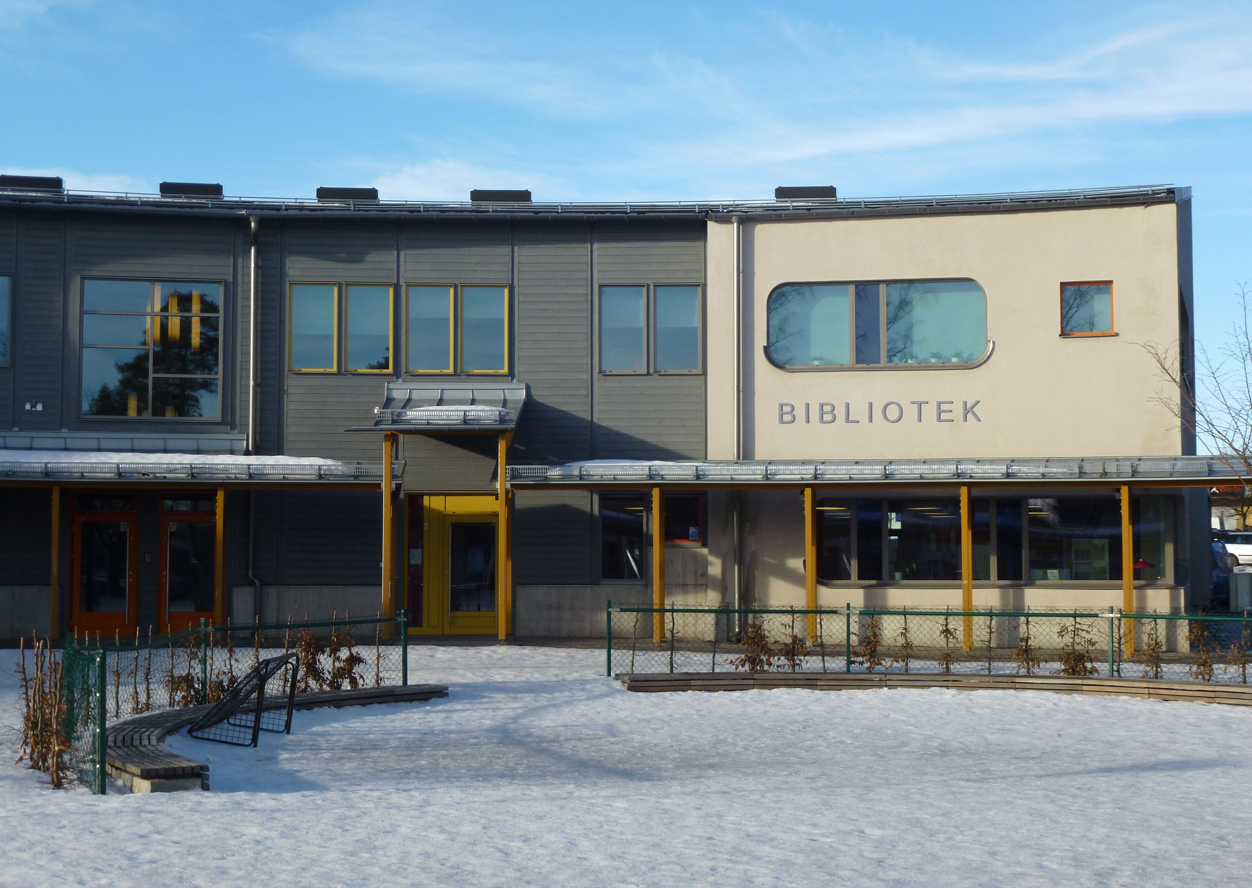 Segeltorps bibliotek (i Segeltorpsskolan)